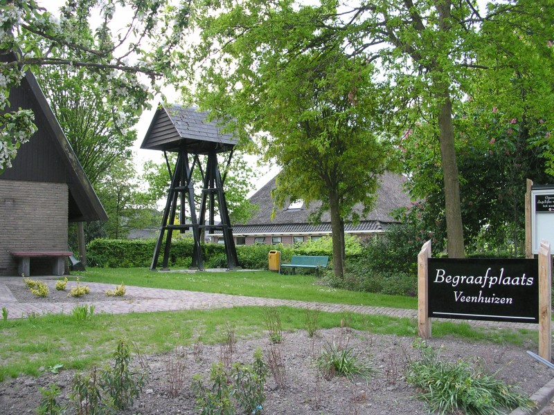 Klokkenstoel van Veenhuizen. Bell chair of Veenhuizen.